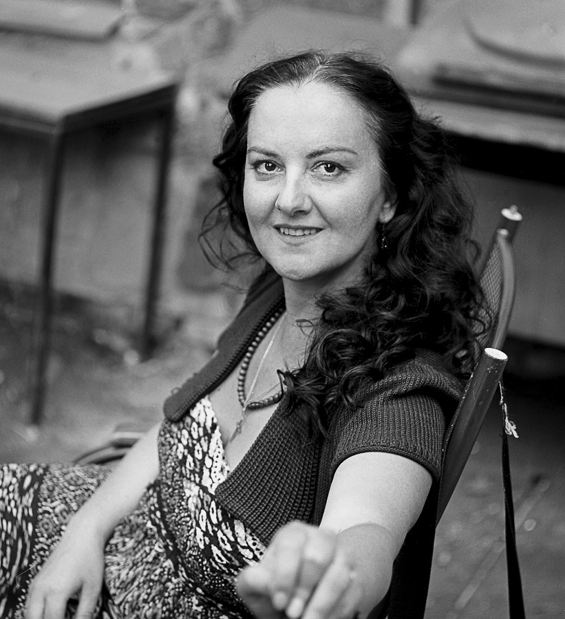 Tamara Černá (SofiG) je fotografka, choreografka, tanečnice a baletní mistr pocházející z Ostravy